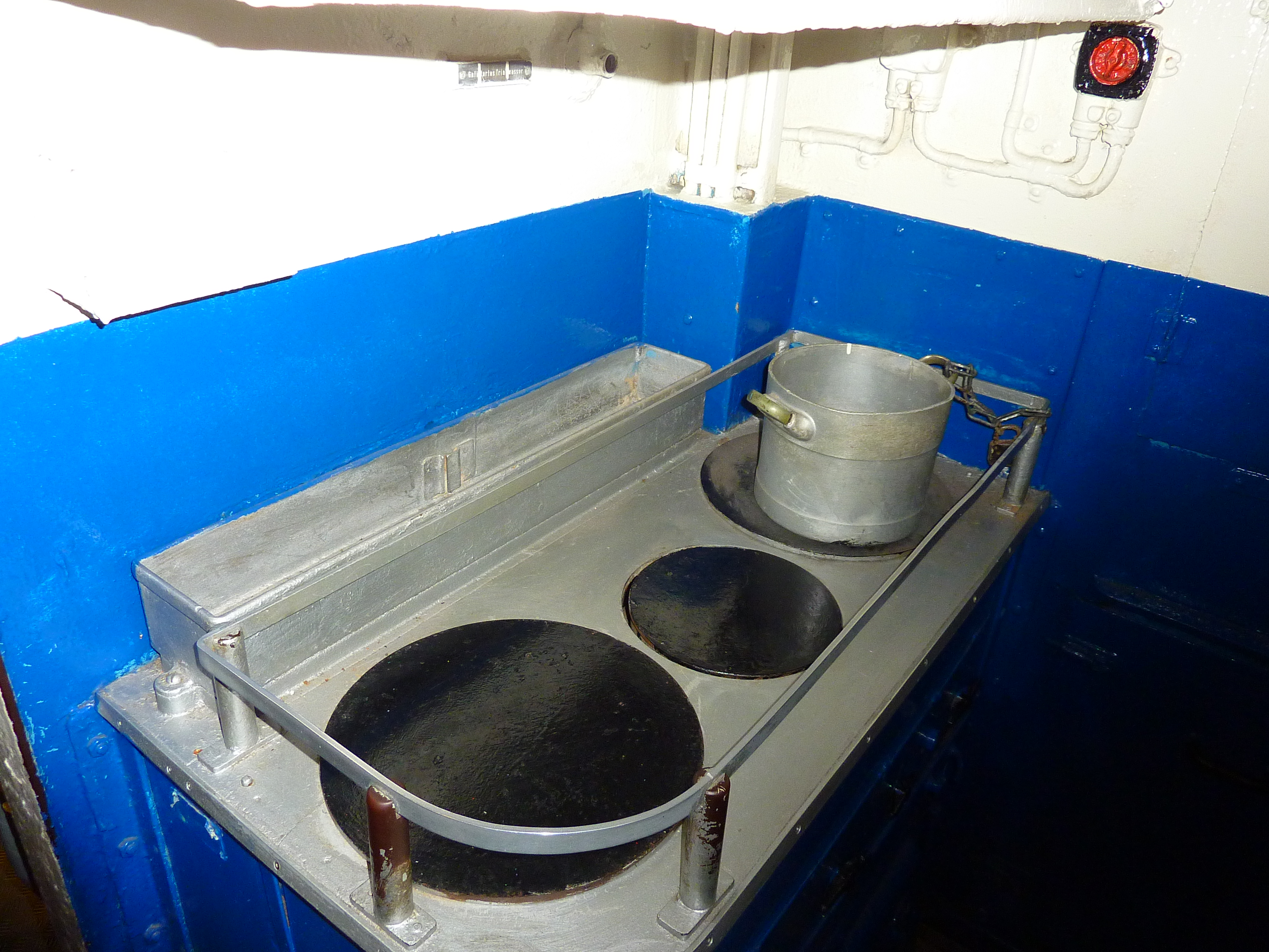 Kombüse und Reserve-WC, U-995. Der Koch ("Smut") ist auf jedem Schiff ein besonders wichtiger Mann, auf einem U-Boot dazu ein Künstler. Auf engstem Raum wurde für 56 Mann mehrmals täglich gekocht. Im Reserve-WC waren Lebensmittel gelagert - es war also zuerst unbenutzbar.